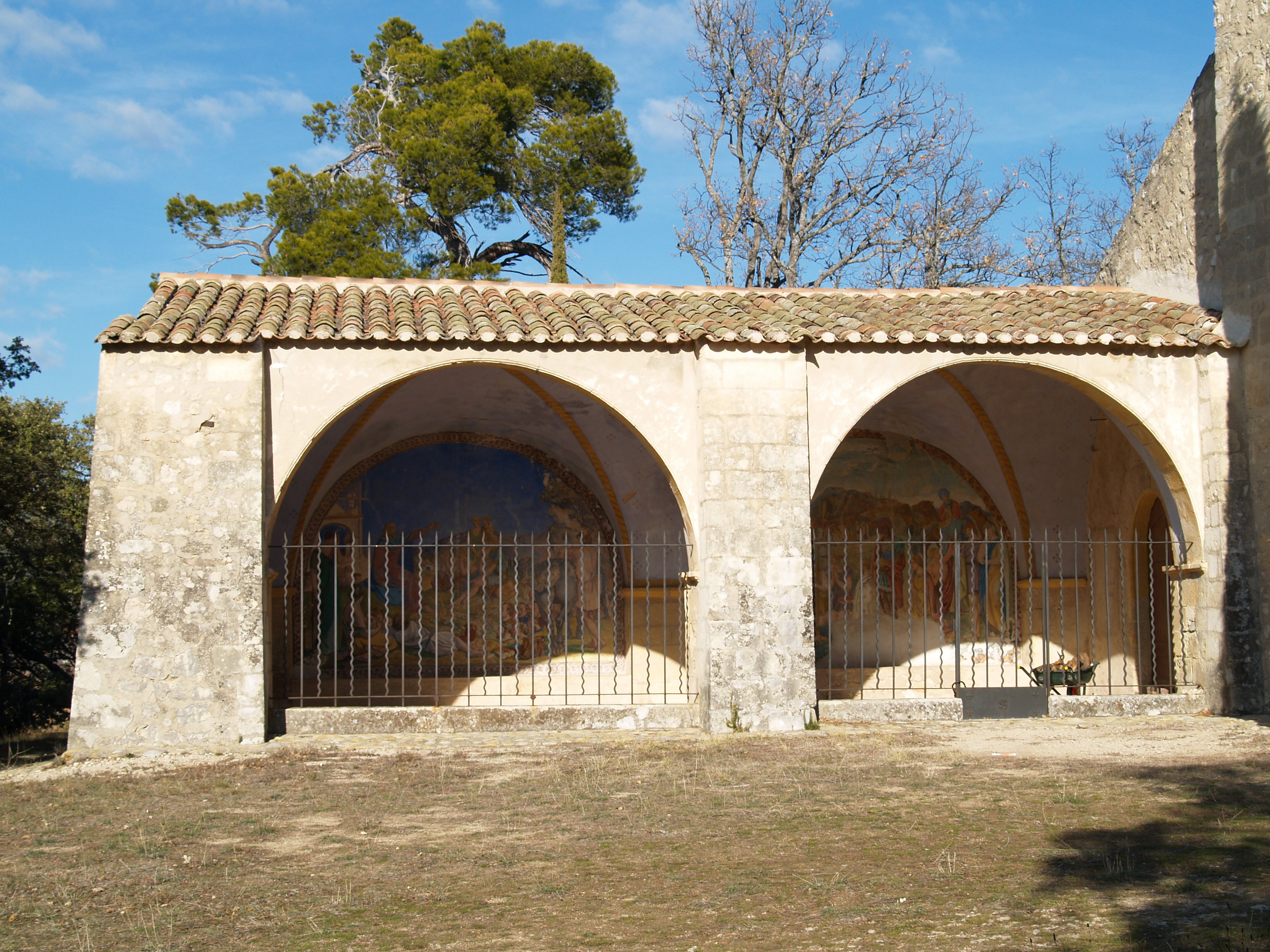 Le porche de l'ermitage - Grambois